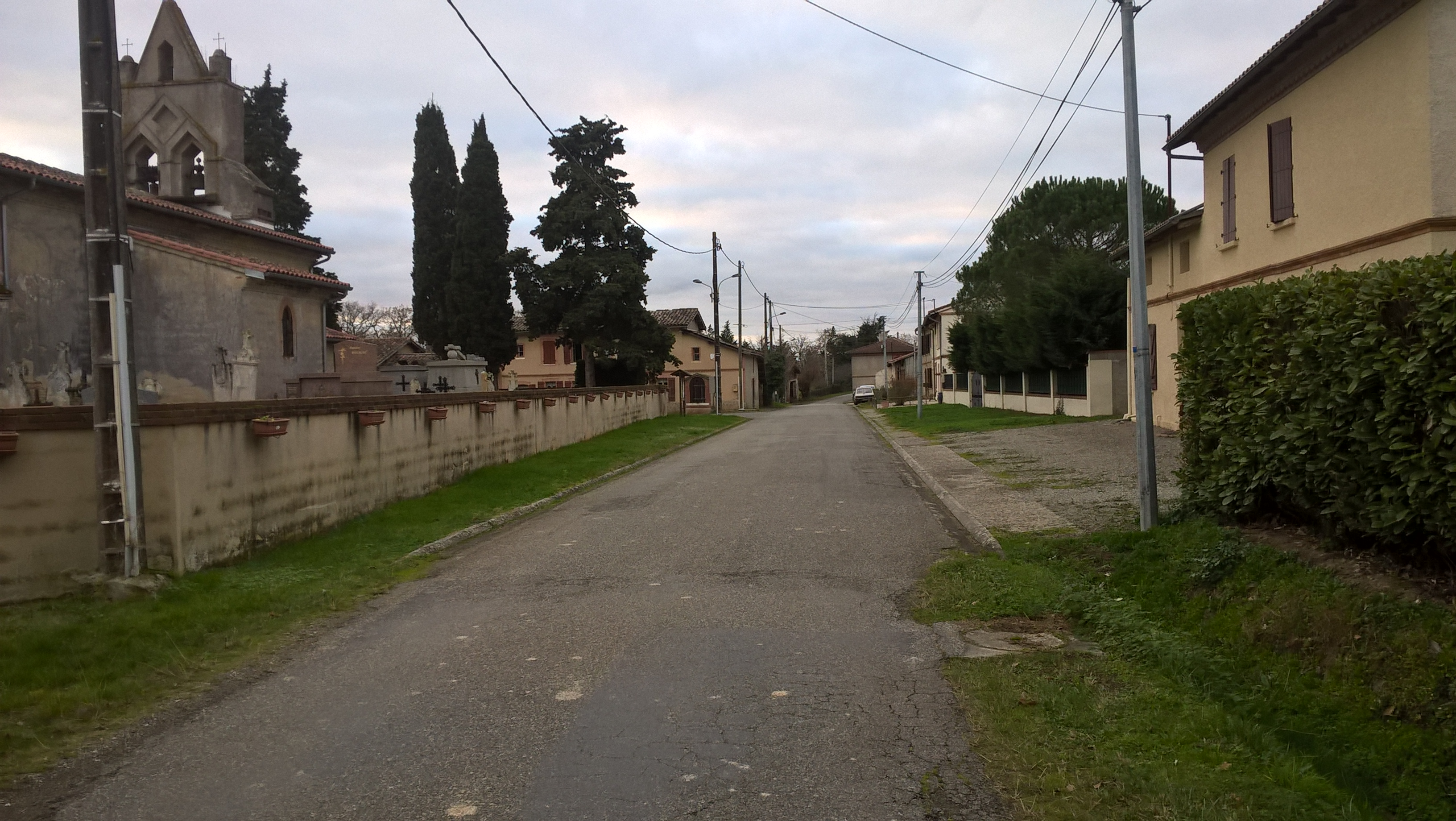 Le hameau de la Salvetat de Sainte-Foy